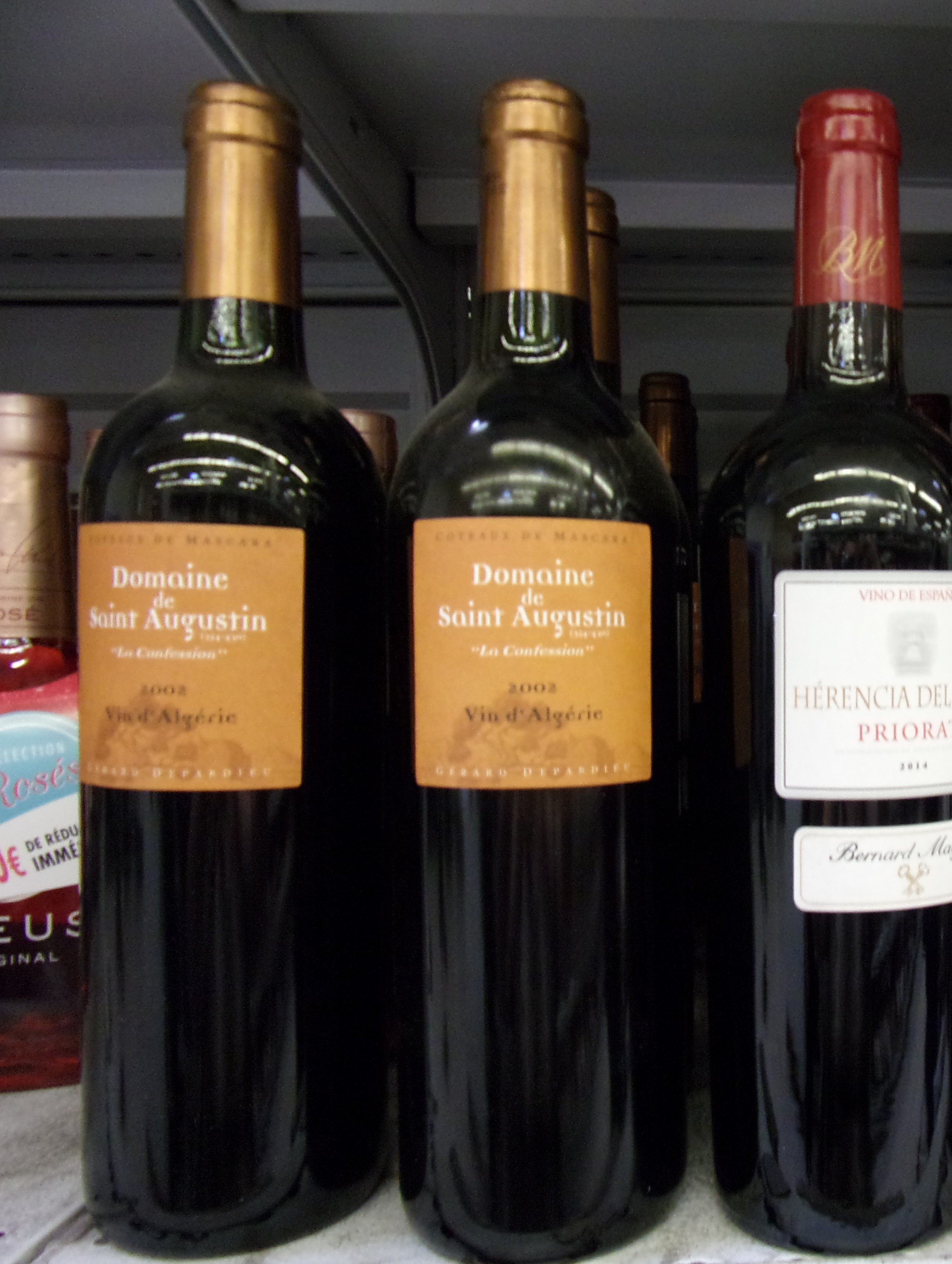 Bouteille de vin rouge d'Algérie